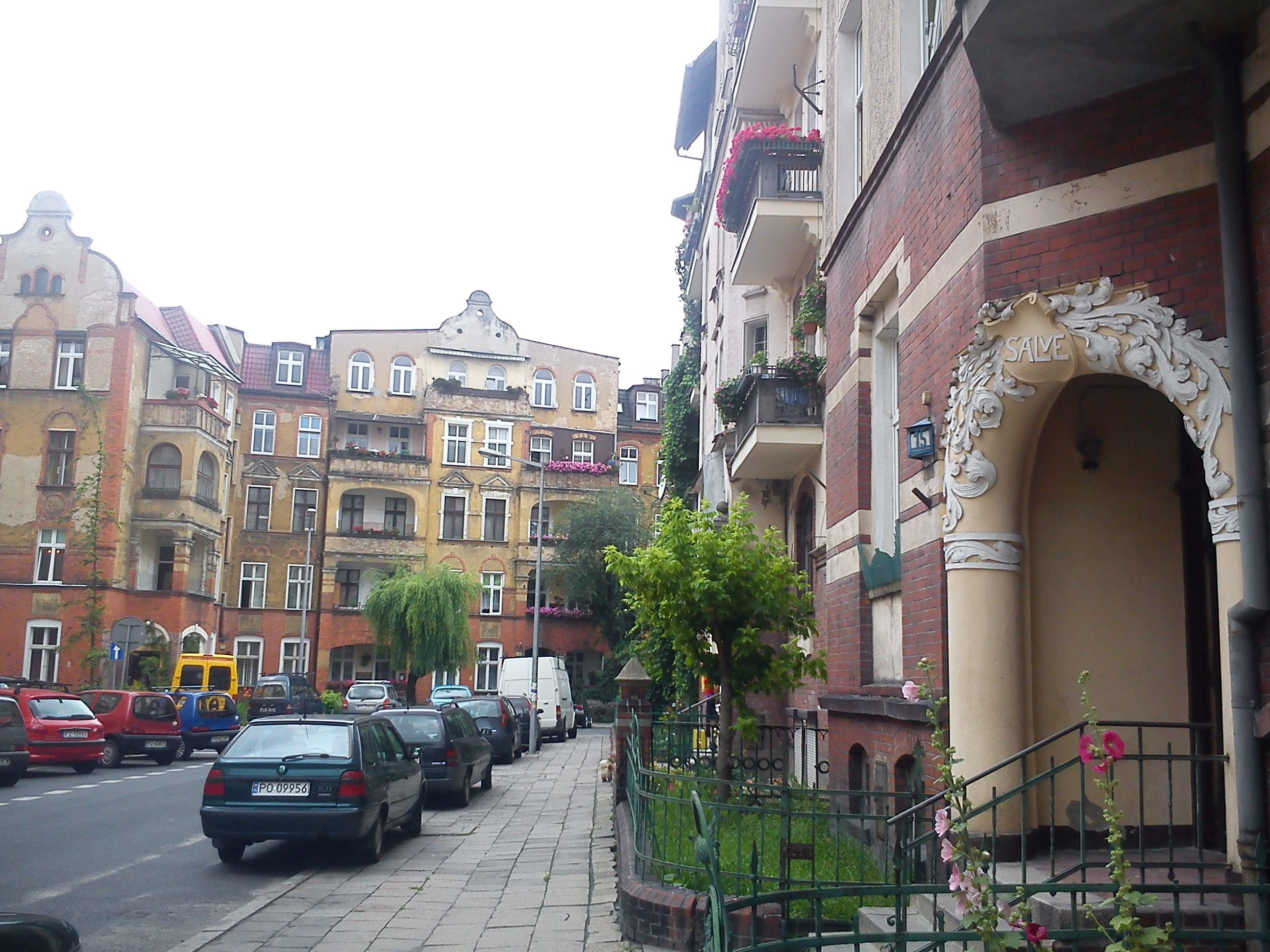 Ulica Skryta, Poznań.